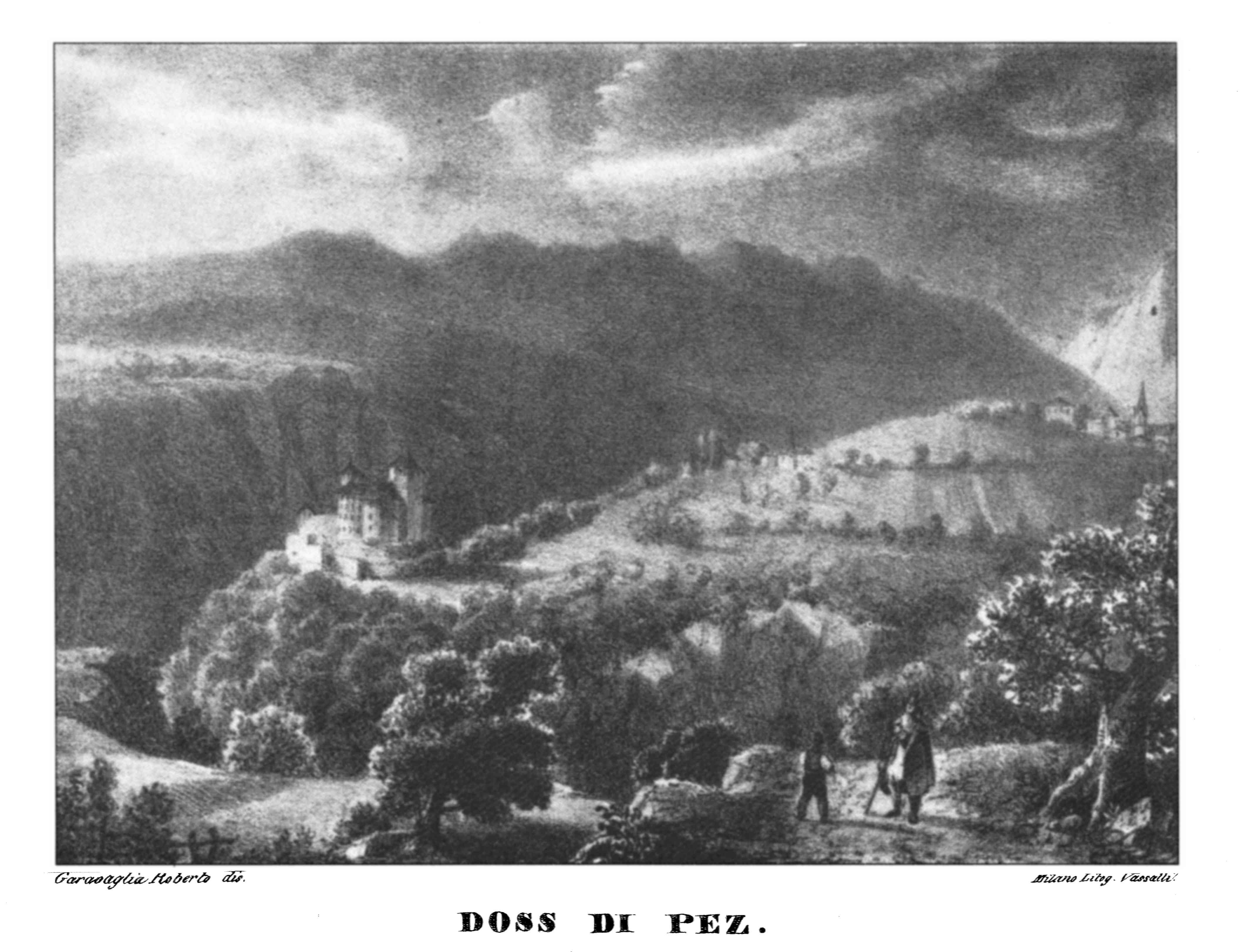 Doss di Pez a Cles circa 1829; da "La Naunia descritta al viaggiatore" di Gioseffo Pinamonti